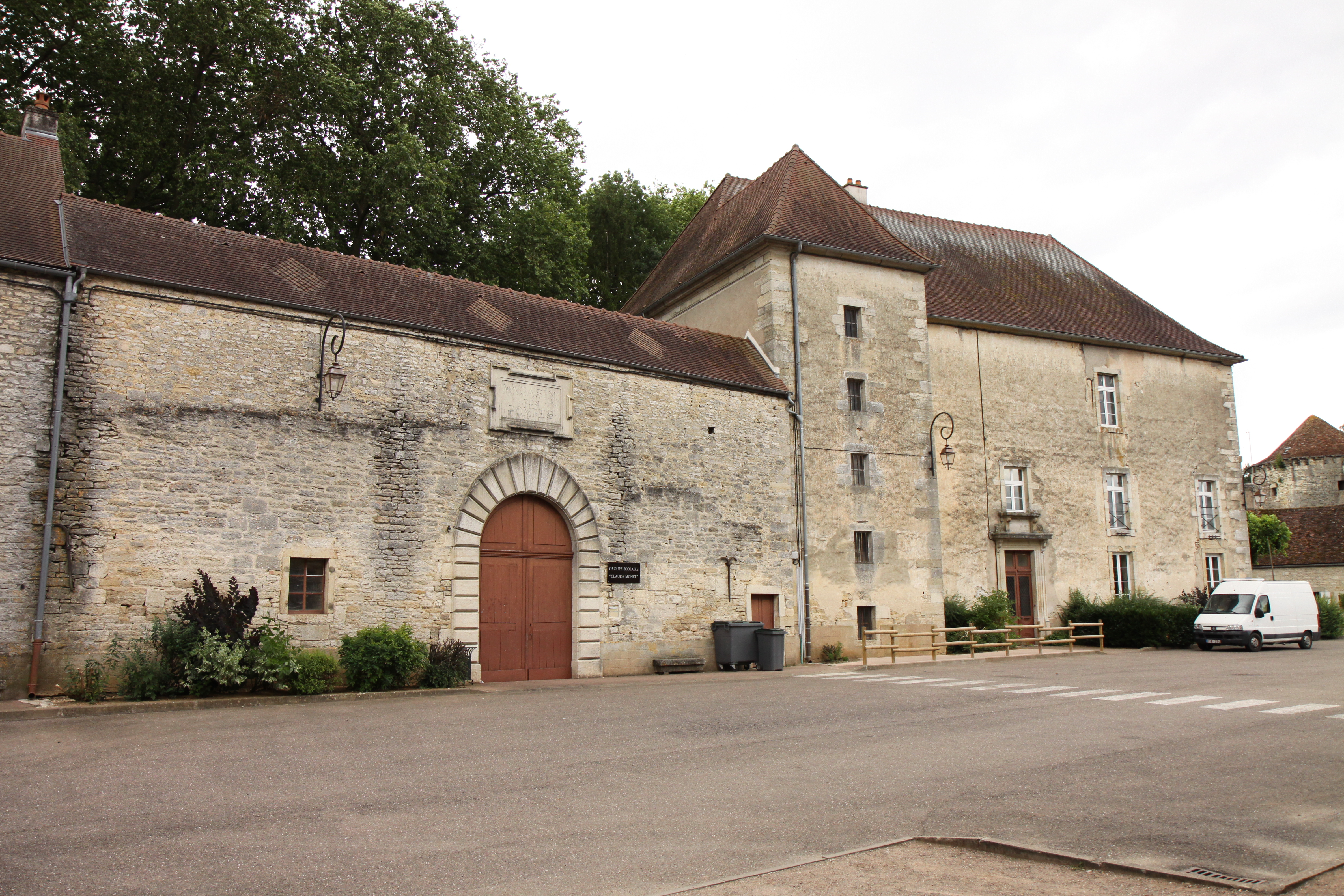 L'abbaye Saint-Pierre de Bèze en Côte-d'Or. .